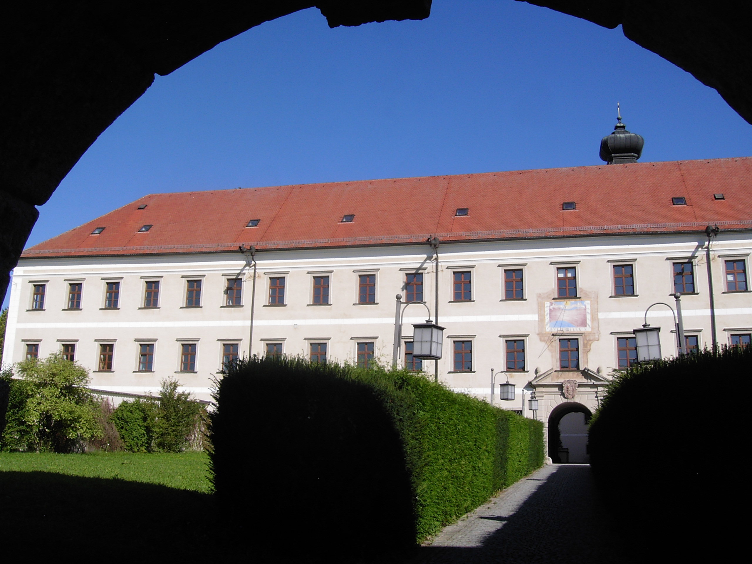 Steyr Gleinker Hauptstraße 20, Gesamtanlage ehemaliges Benediktinerstift mit Pfarrhof, Südansicht des Klostergebäudes